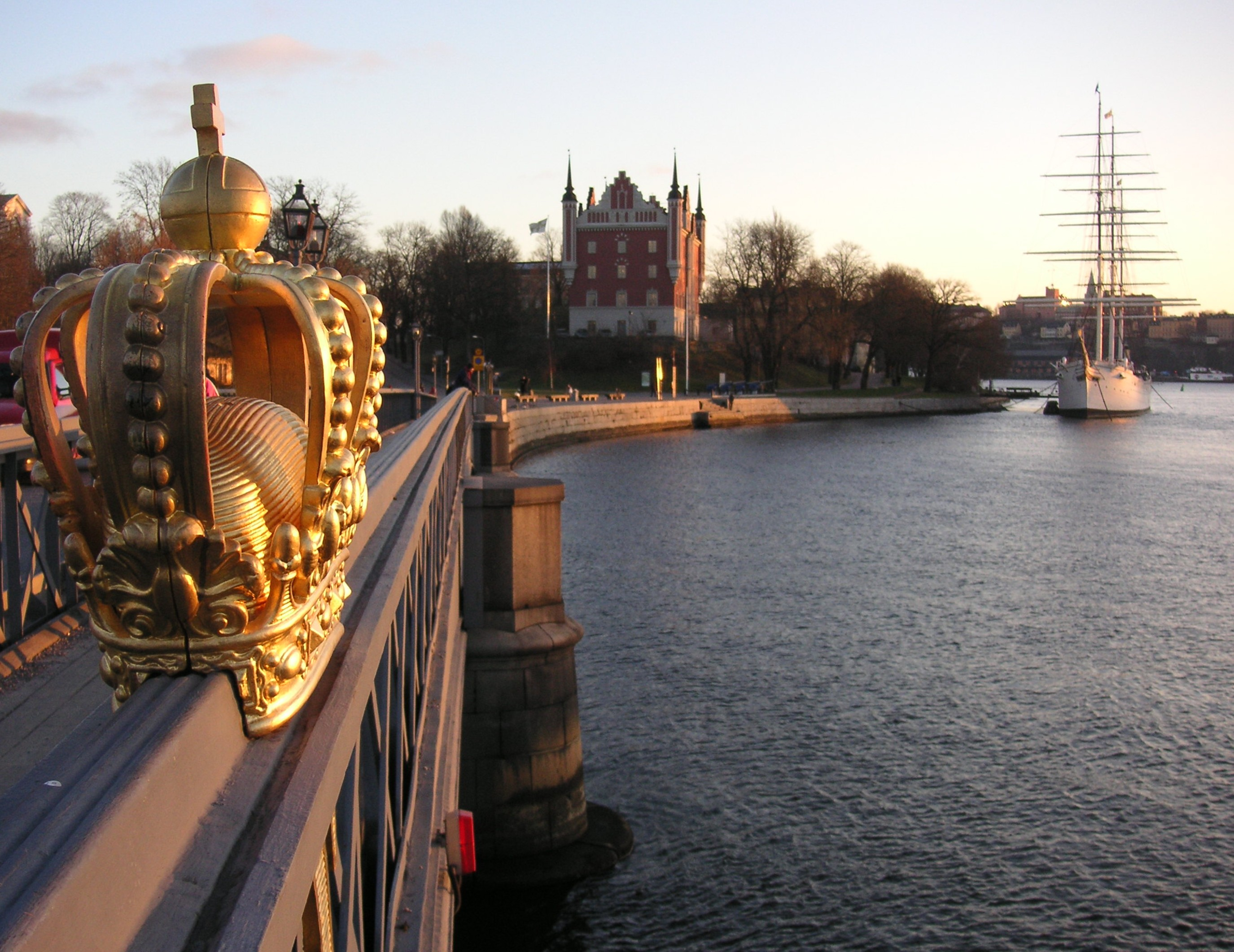 Skeppsholmsbron, Brücke zwischen Blasieholmen und Skeppsholmen in Stockholm, im Hintergrund die "af Chapman"